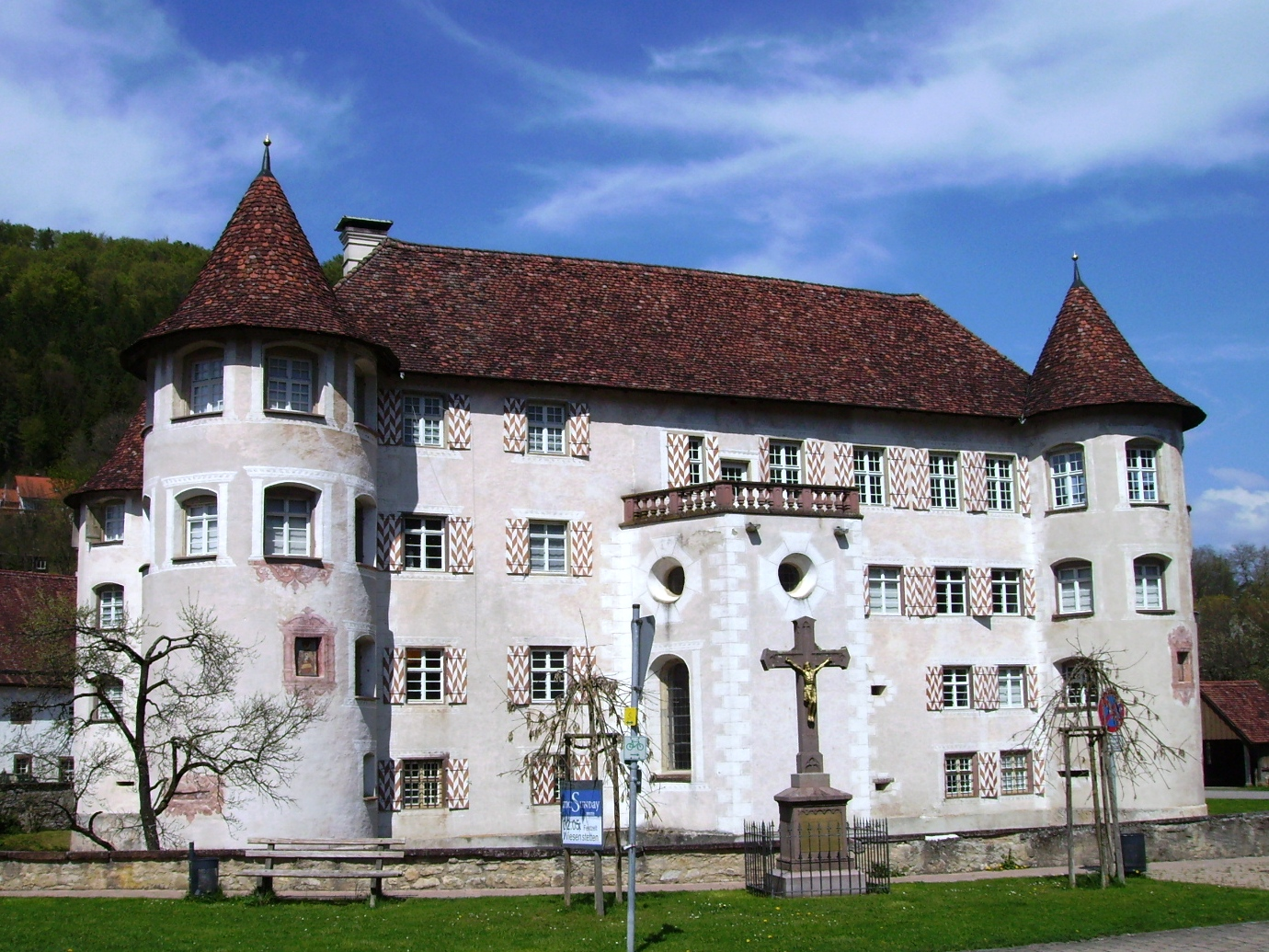 Wasserschloss Glatt bei Sulz.